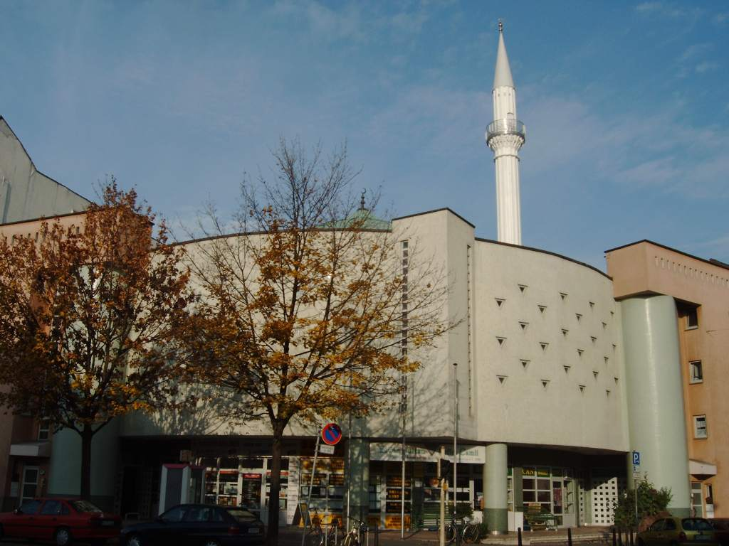 Moschee Mannheim